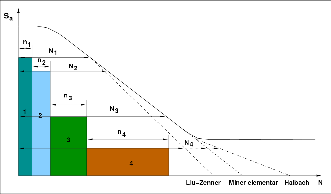 Linear damage accumulation